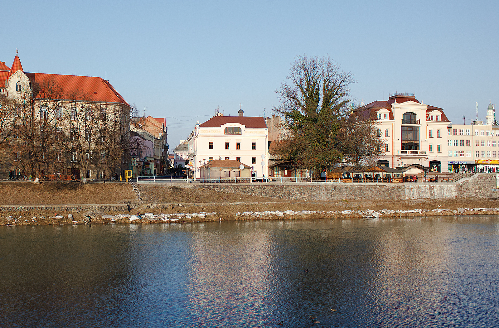 Ясень Масарика в Ужгороді. Пам'ятка природи.